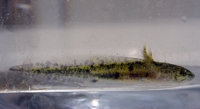 larve de Pleurodeles de Waltl